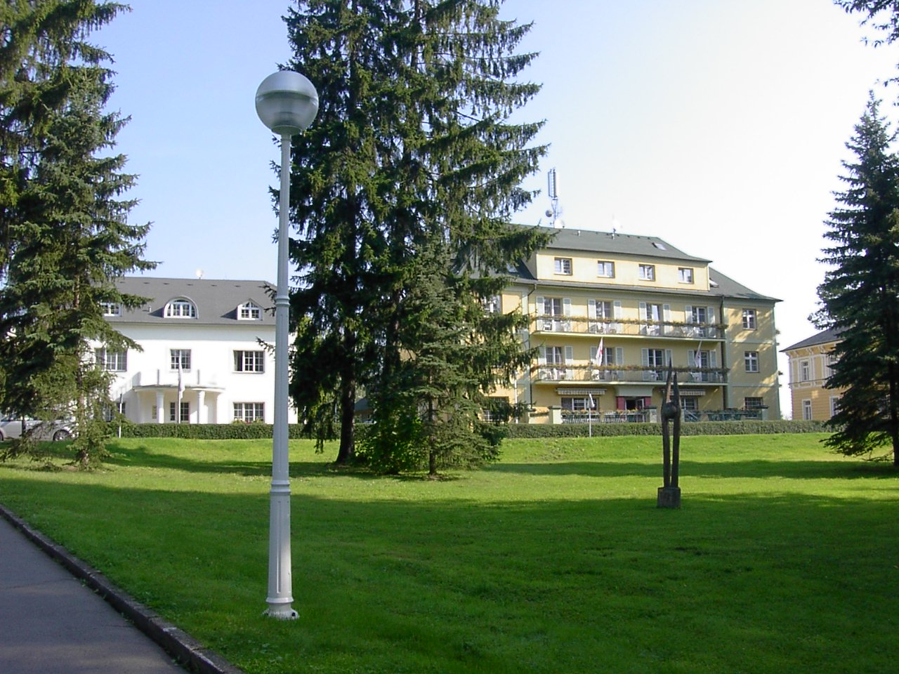 Gardens in spa Konstantinovy Lazne, Czech Republic. Konstantinovy Lázně